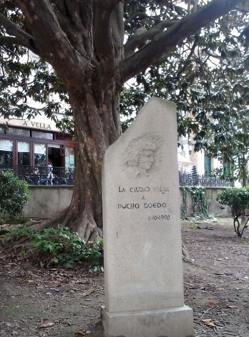 Homenaxe a Pucho Boedo na Cidade Vella da Coruña, Galiza Spain